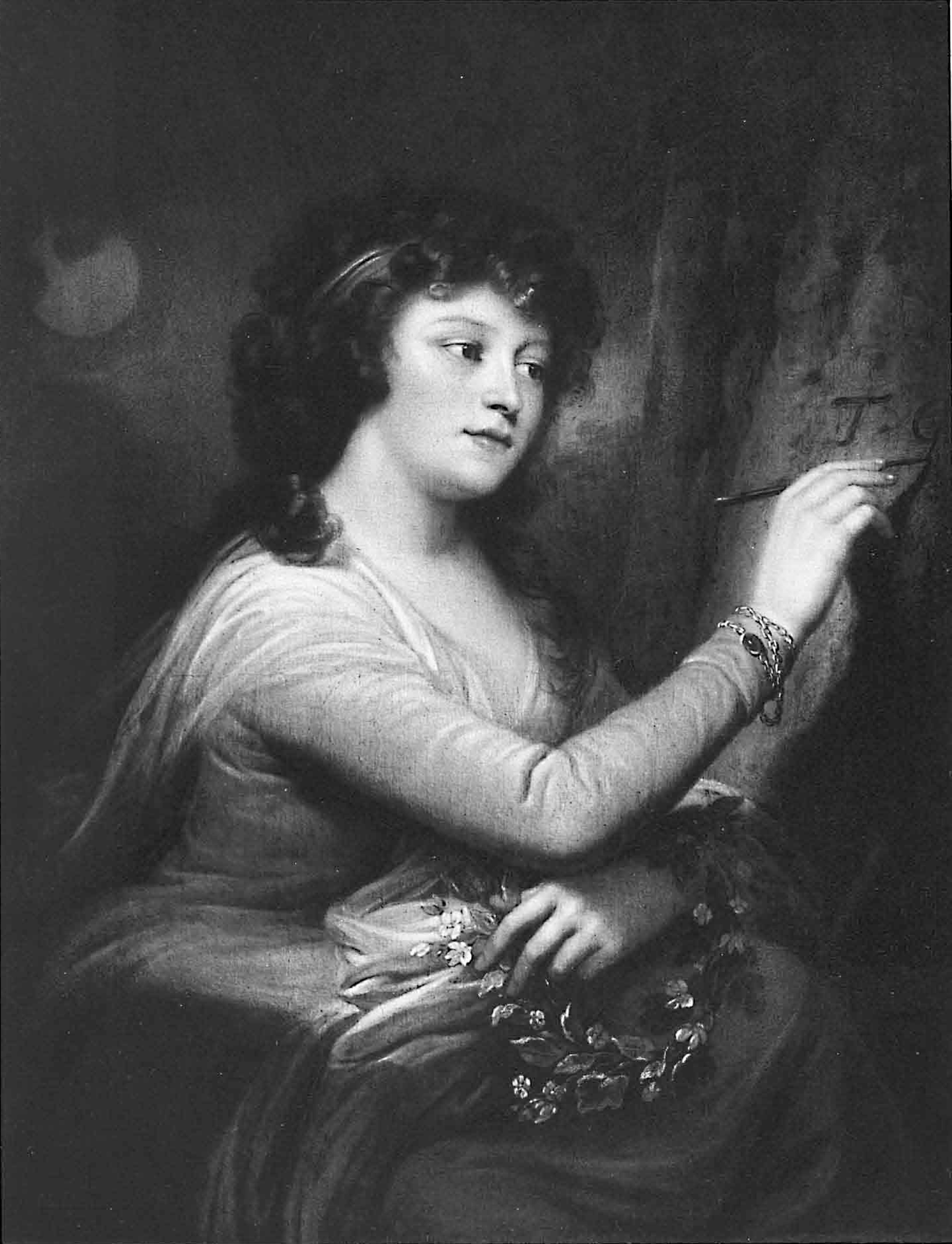 Портрет княгини Прасковьи Юрьевны Гагариной